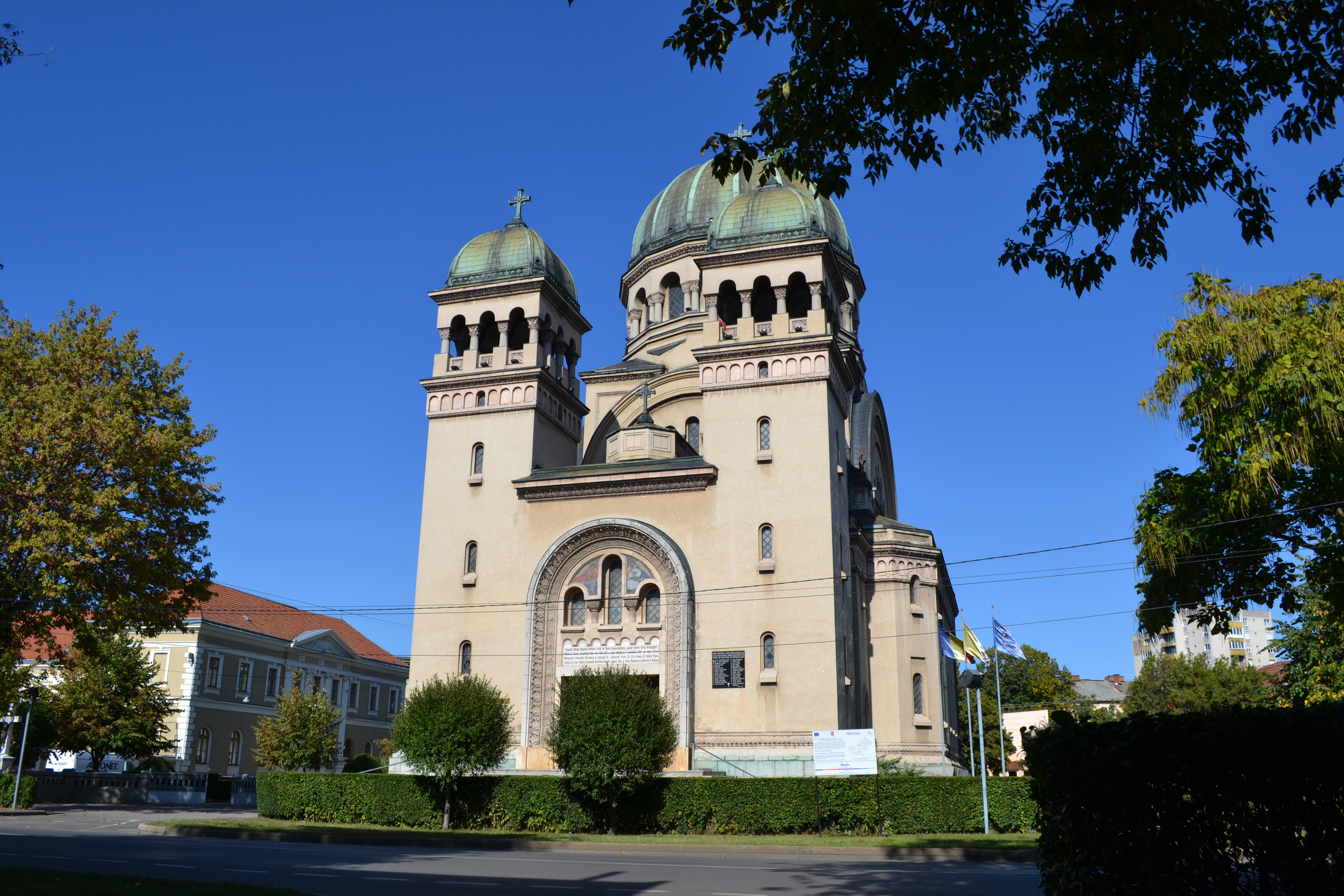 Biserica Sf Arhangheli Mihail si Gavriil Satu Mare